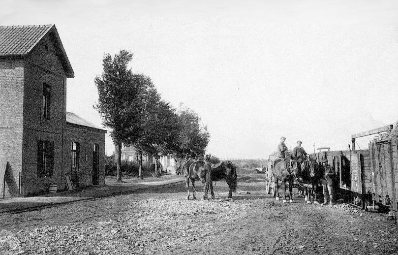 Carte postale ancienne - Editeur : Union Photographique Parisienne. 40, rue de Seine. Paris Inchy - la gare du Chemin de fer du Cambrésis et un train